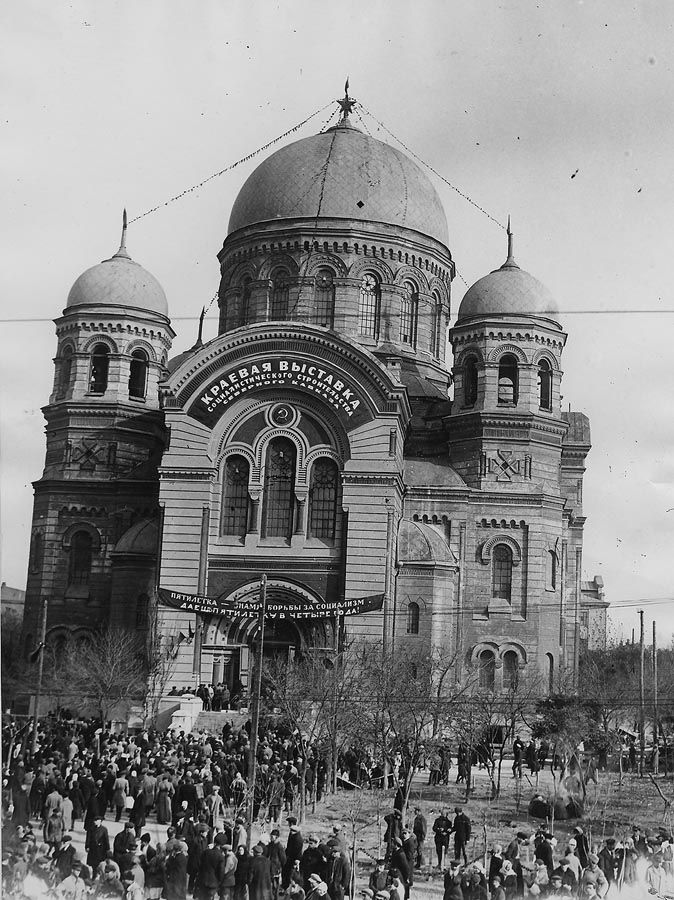 Александро-Невский собор Ростова-на-Дону после революции